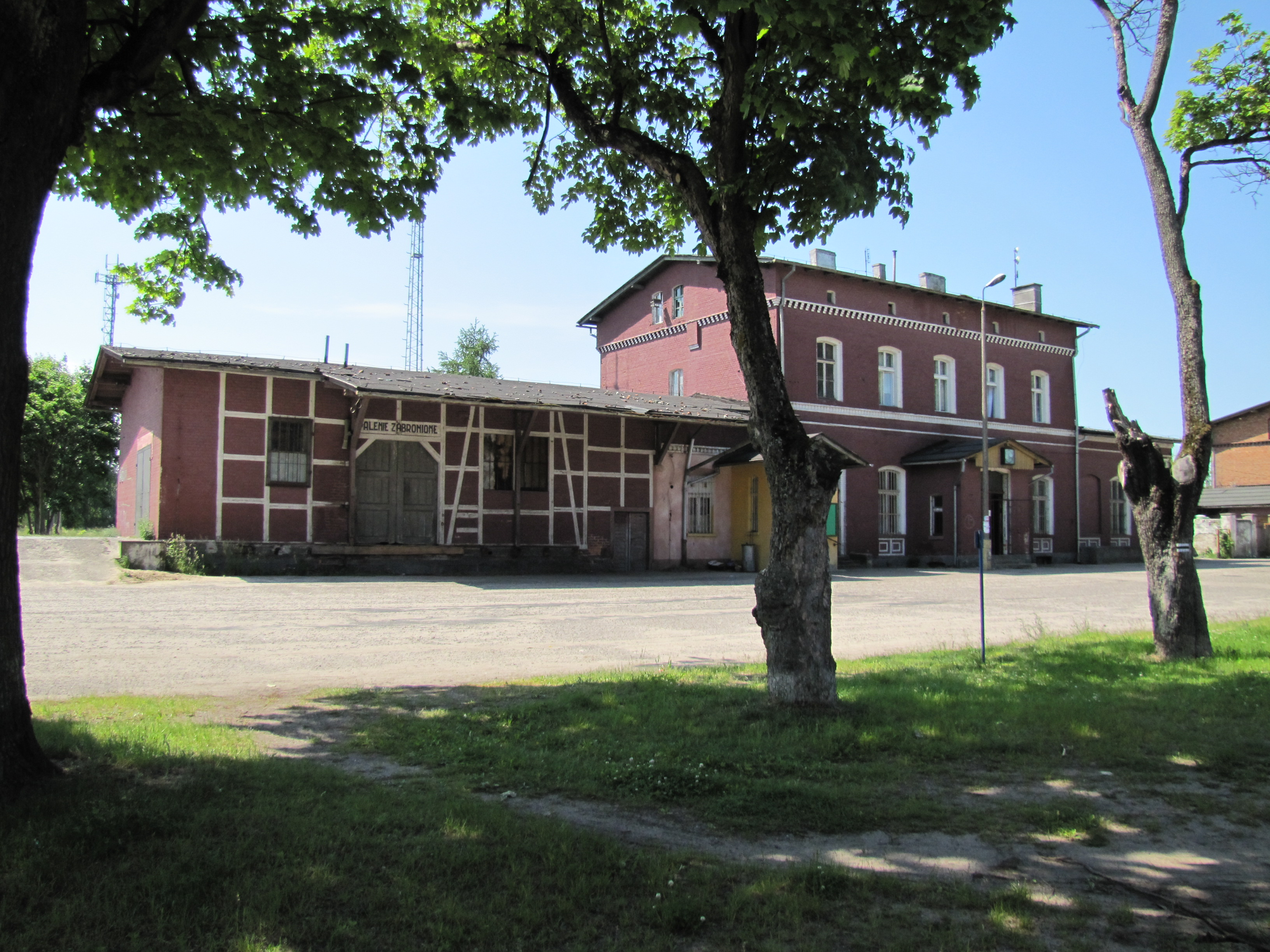 Dworzec PKP widziany od strony Osady.